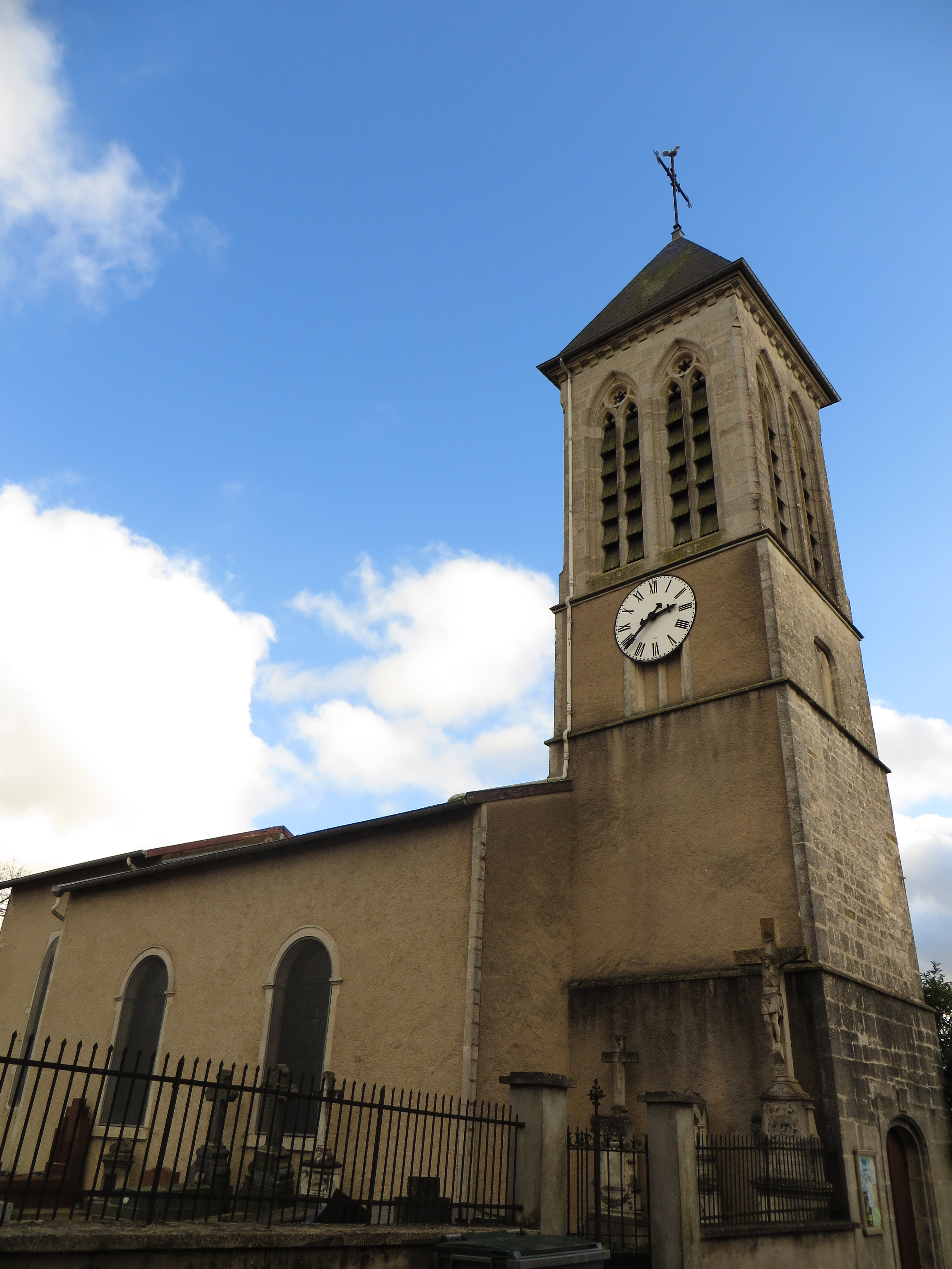 Rosieres Haye eglise